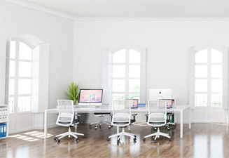 Coworking en España